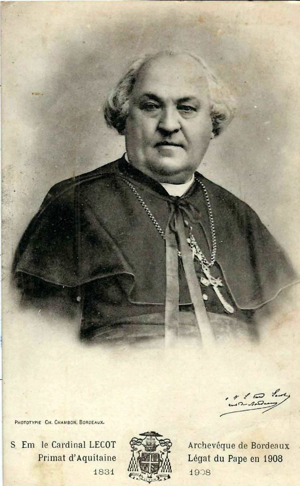 Funérailles du Cardinal Lécot